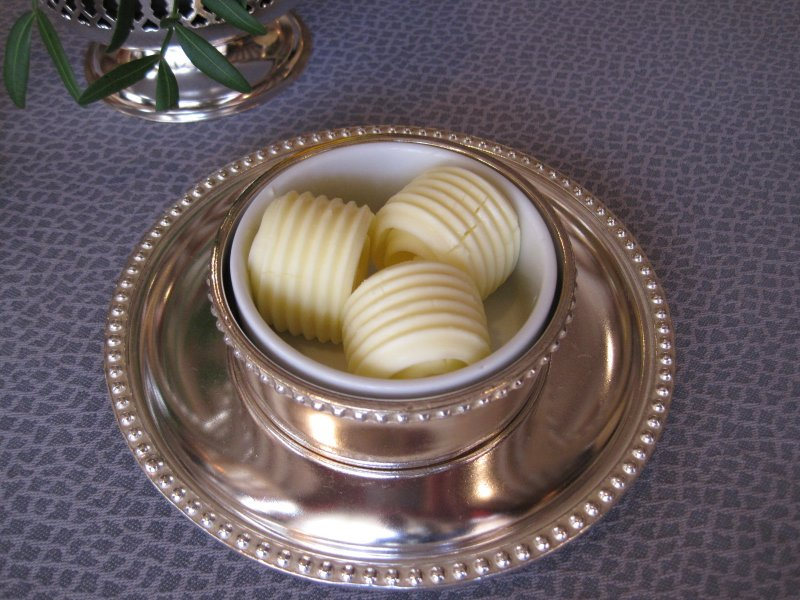 Beurre chez Jean Paul Jeunet à Arbois (dans le Jura )